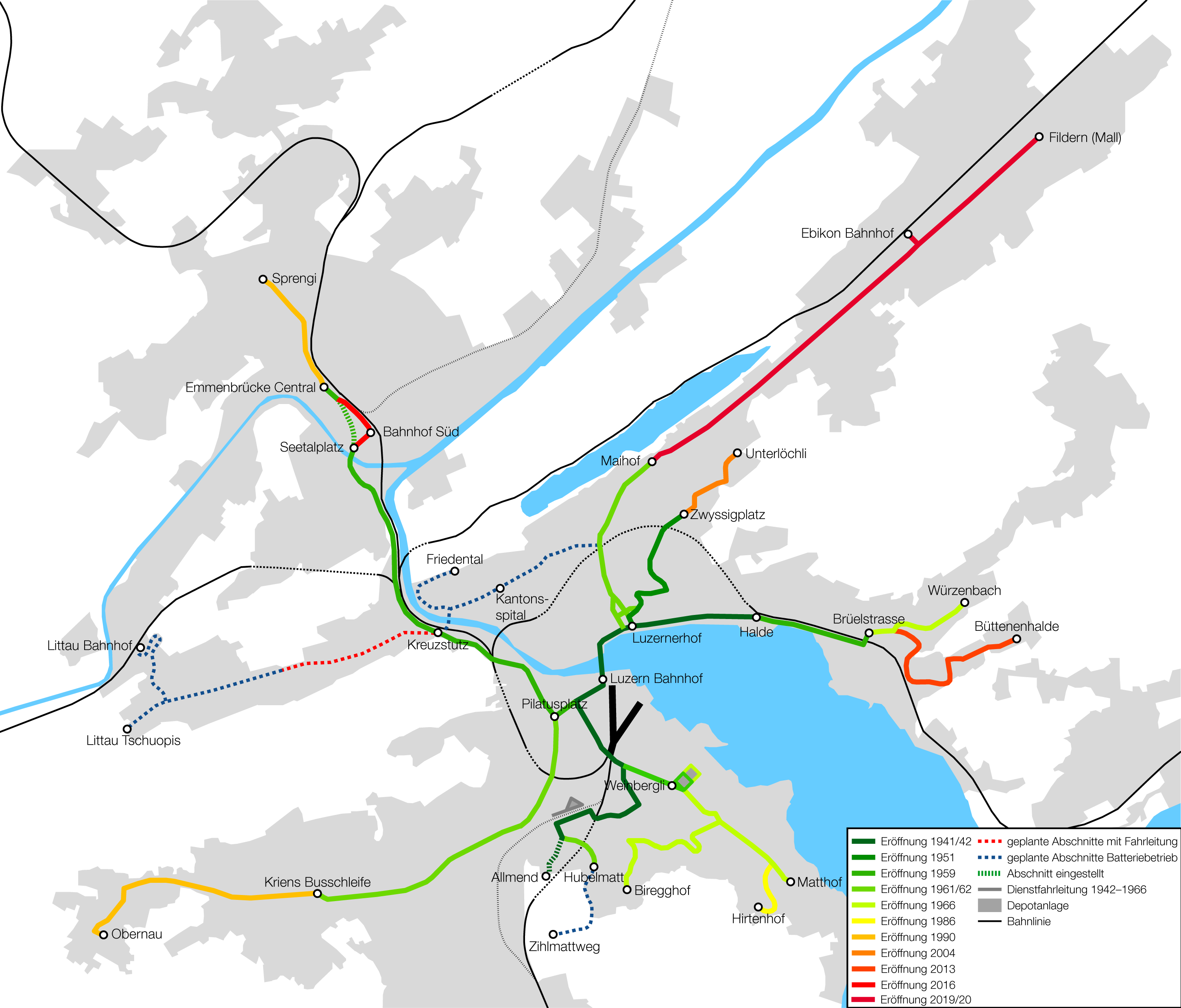 Übersichtskarte der Netzentwicklung des Trolleybus Luzern. Leicht angepasste Version, ursprünglich 2016 in der Jubiläumsbroschüre "1941-2016: 75 Jahre Trolleybus in Luzern" erschienen